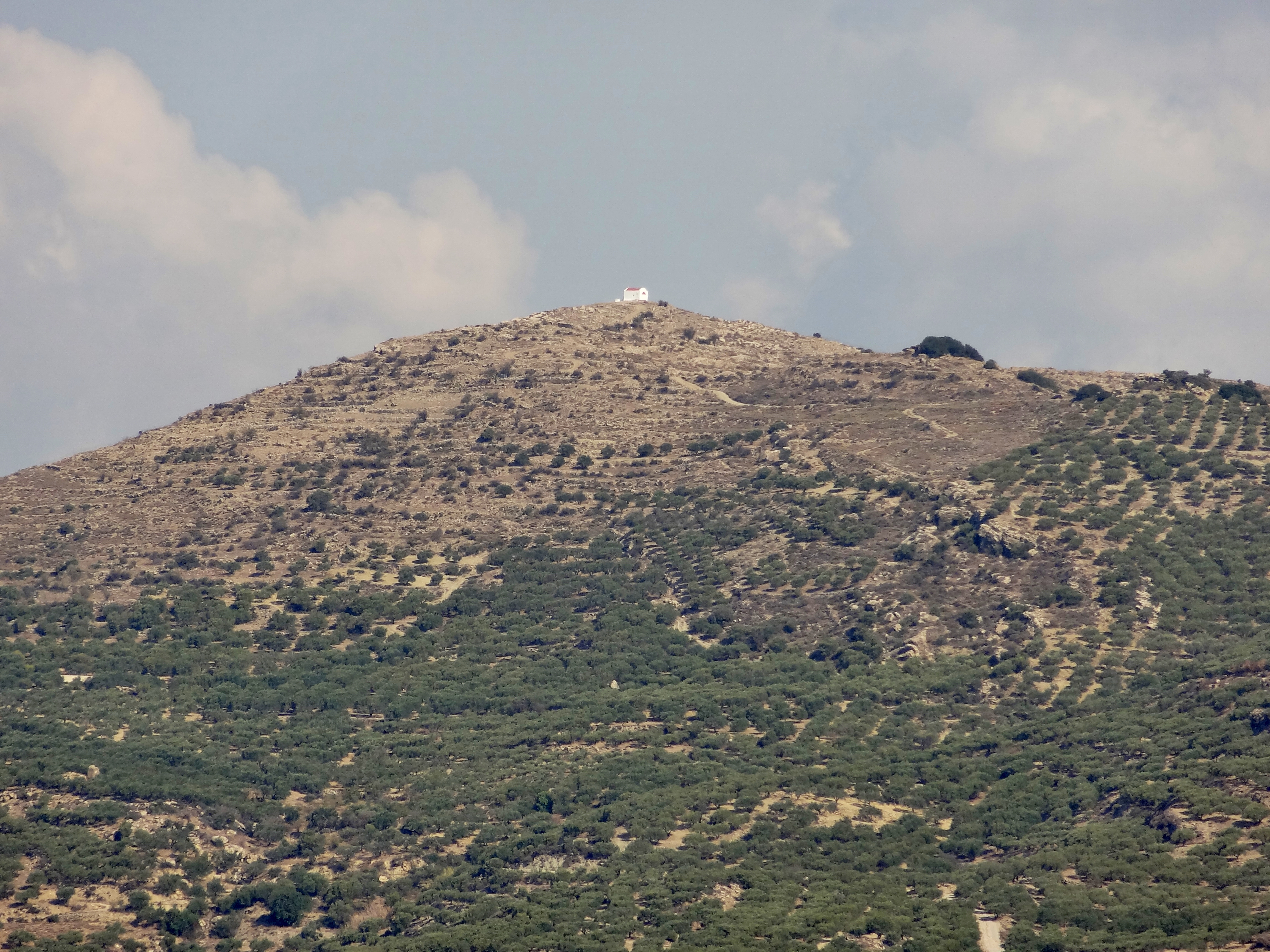 Blick auf die Kapelle Profitis Ilias (Προφήτης Ηλίας) bei Afrati (Αφράτι), Gemeinde Viannos, Regionalbezirk Iraklio, Kreta, Griechenland